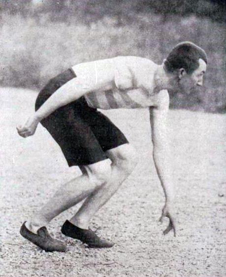 Georges Garnier (RCF), champion de France du 800 mètres en 1897.